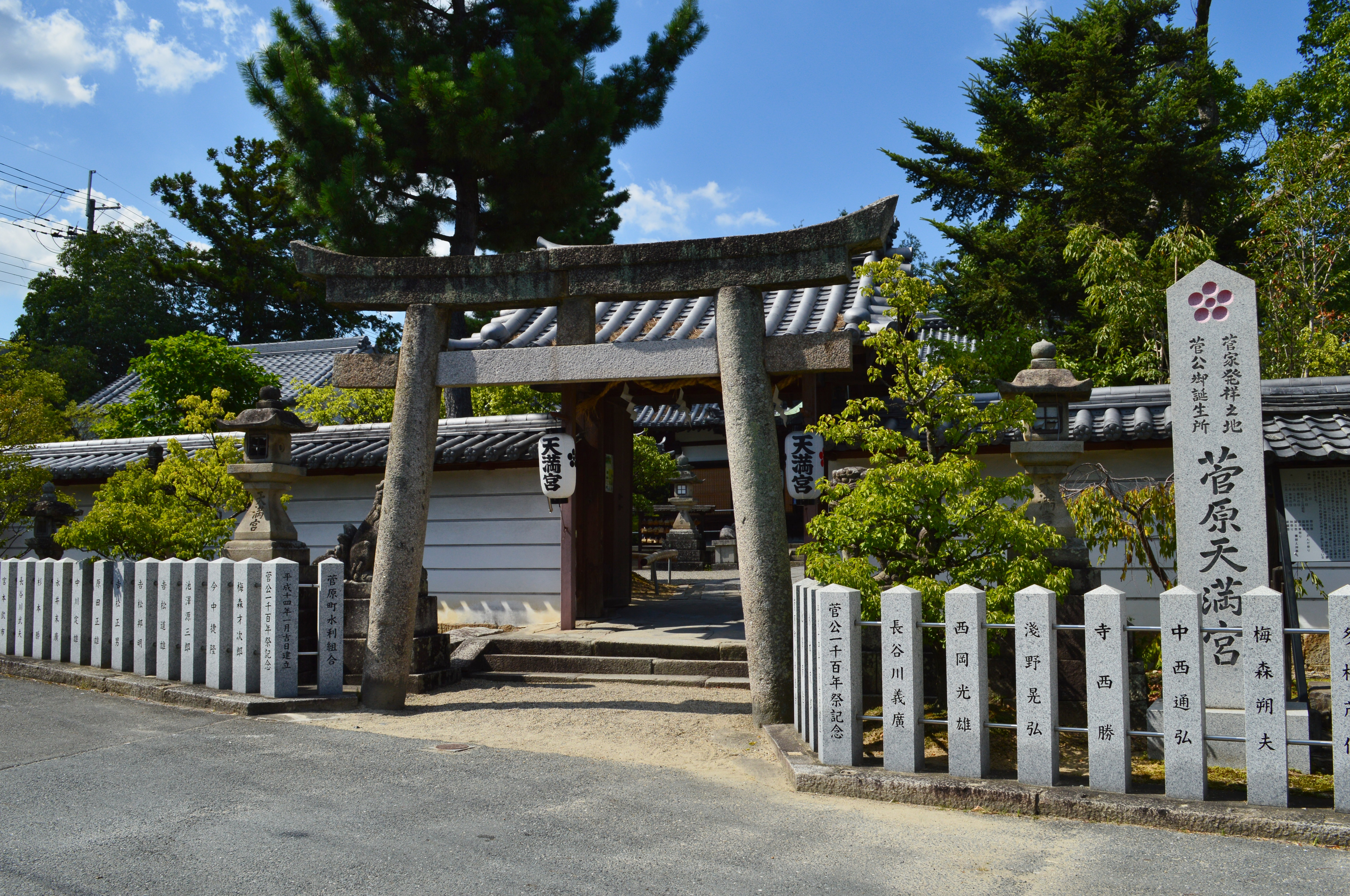 菅原神社 (奈良市) 境内入り口